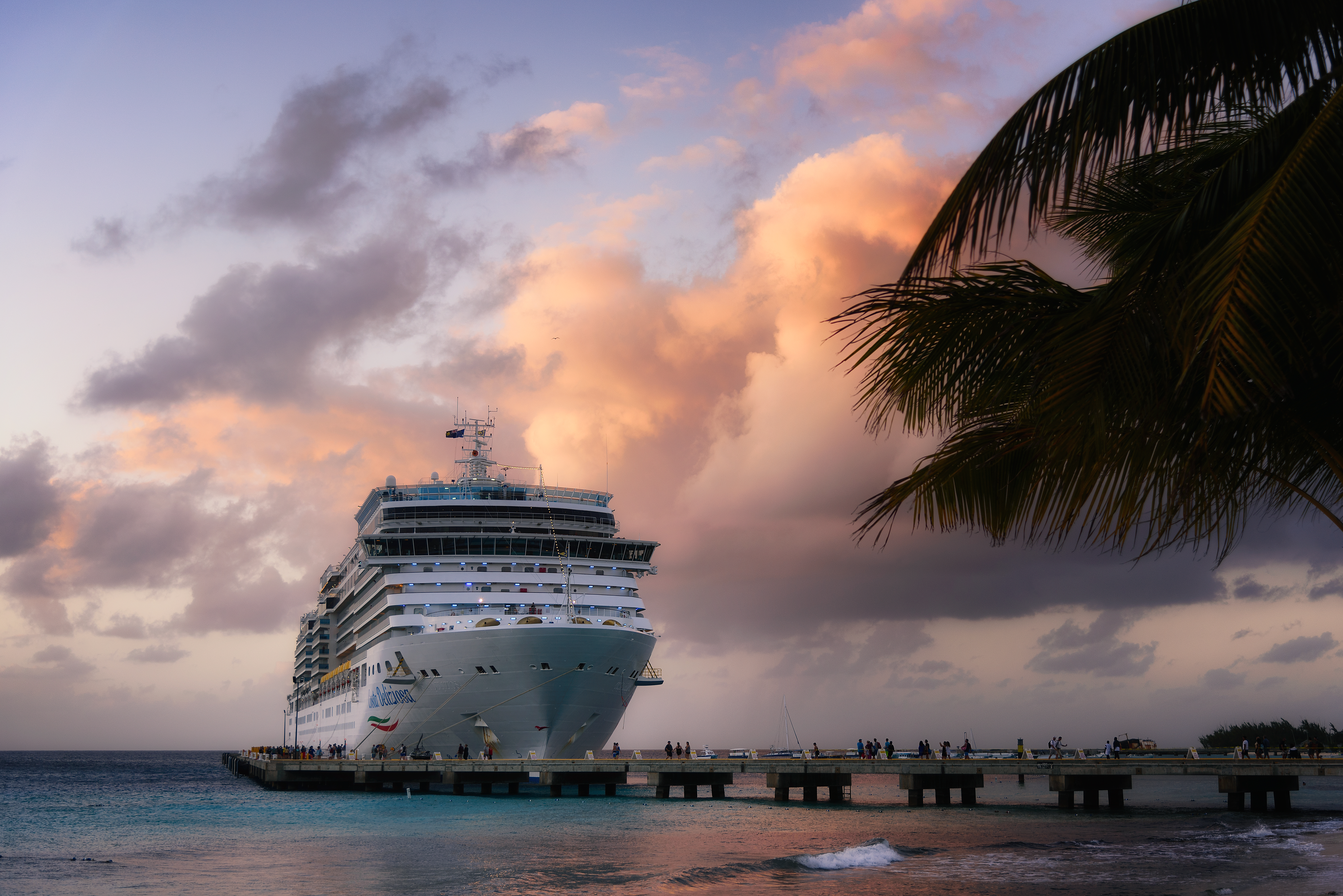 Sunset in Grand Turk Island.